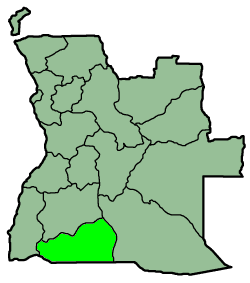 A map from province Cuando Cunene, Angola